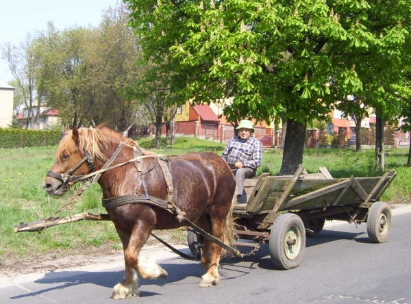 Konia na Stokach też można dość często dostrzec (ul. Henrykowska).